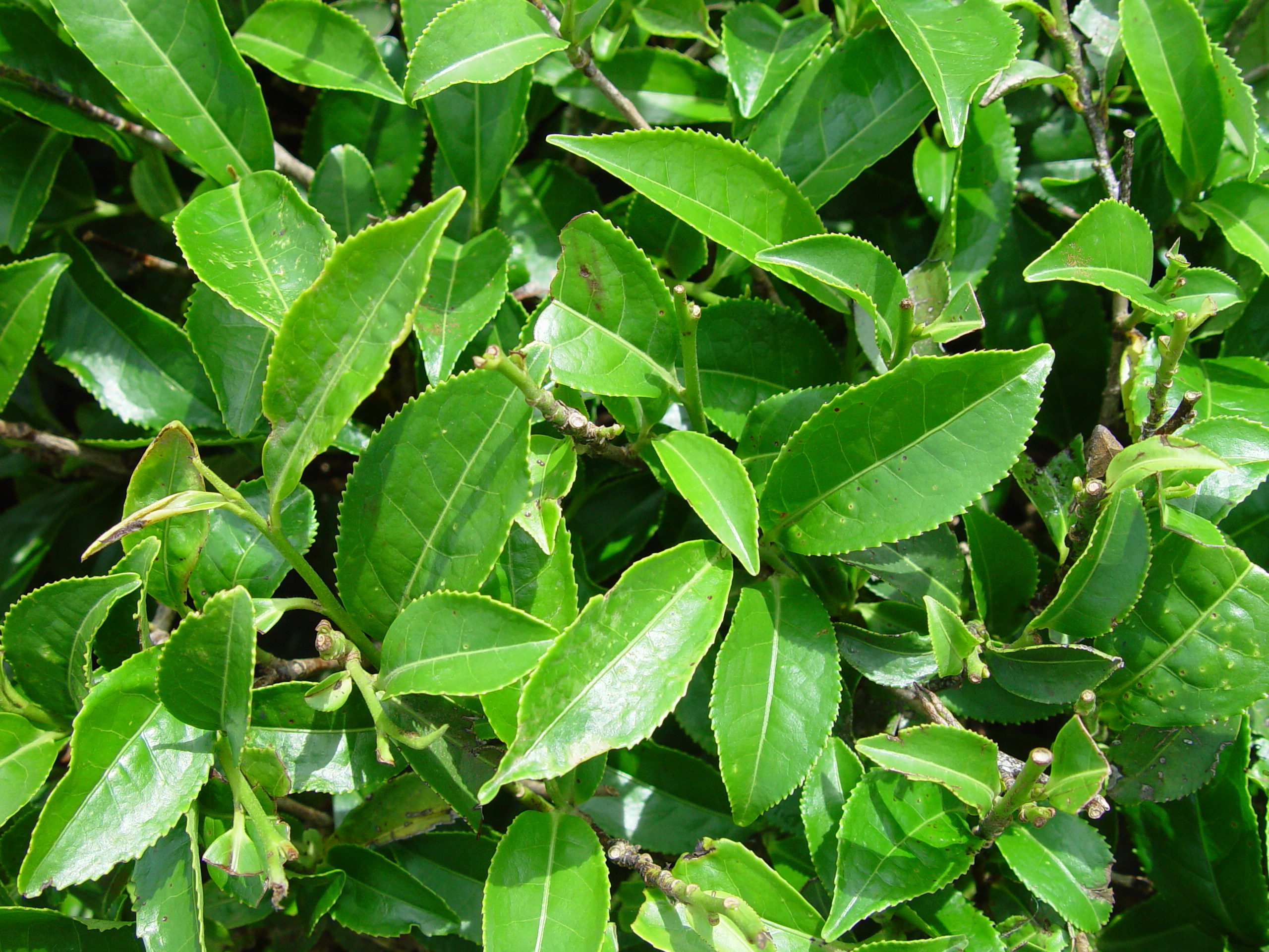 Closeup of leaves of tea plant Camellia sinensis